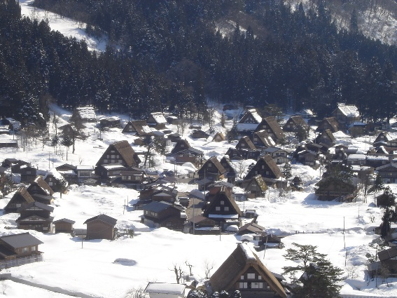 白川郷合掌集落。2006年3月、投稿者による撮影。 撮影：Sony P-100の標準にてノーフラッシュで撮影。 加工:画像の縮小。